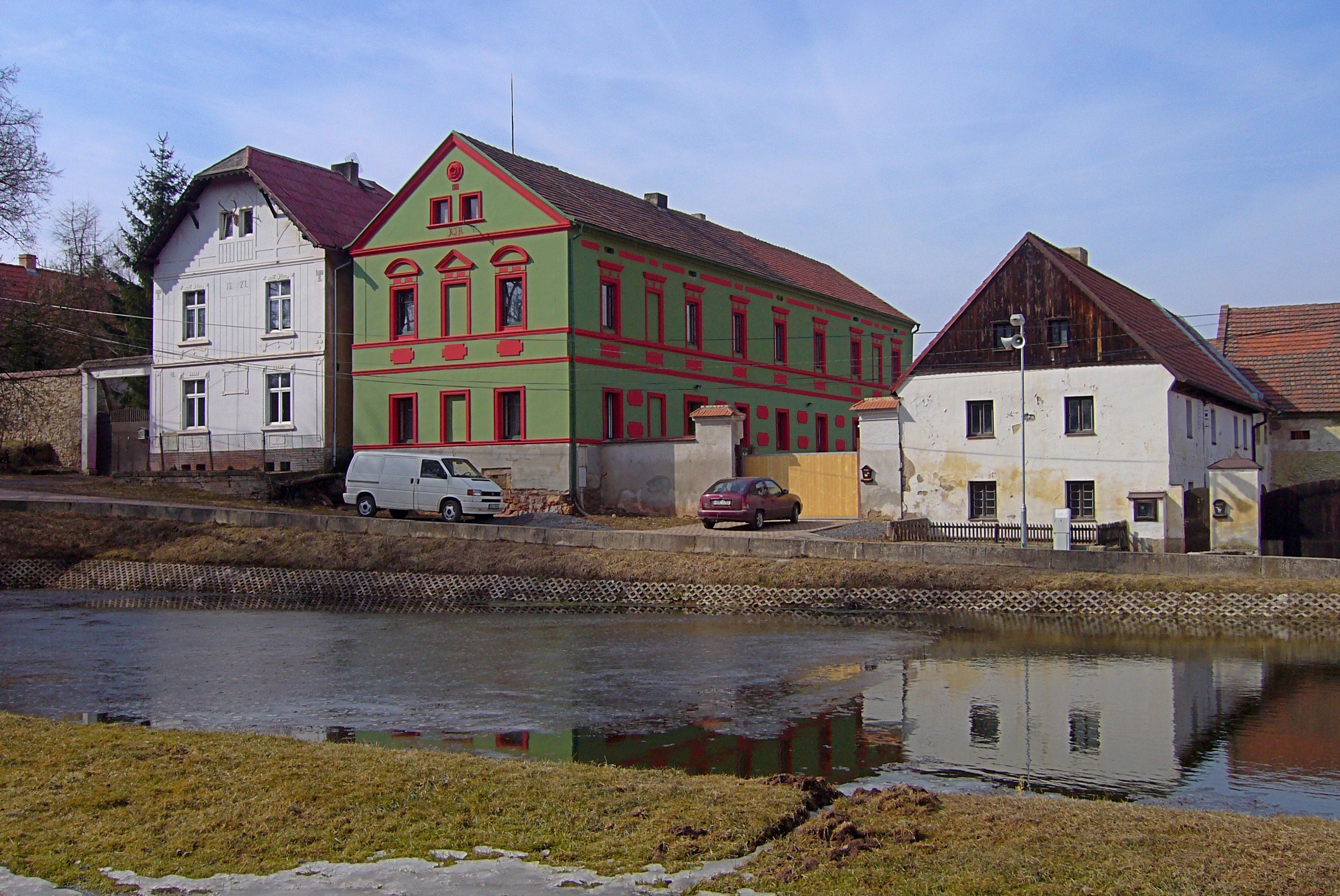 Očihovec - náves